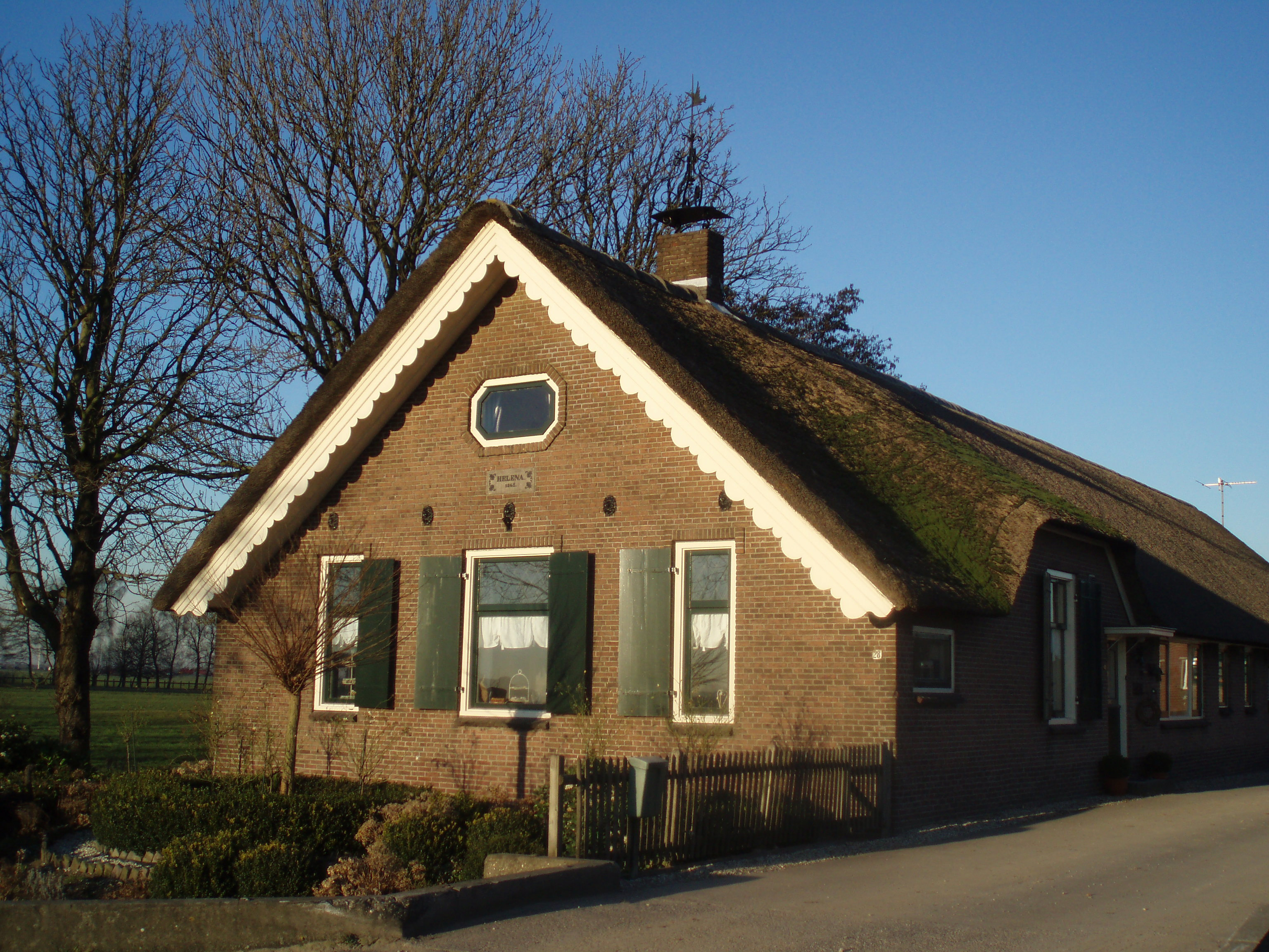 Monumentale boerderij Helena uit 1862 aan de Cattenbroekerdijk in Montfoort.